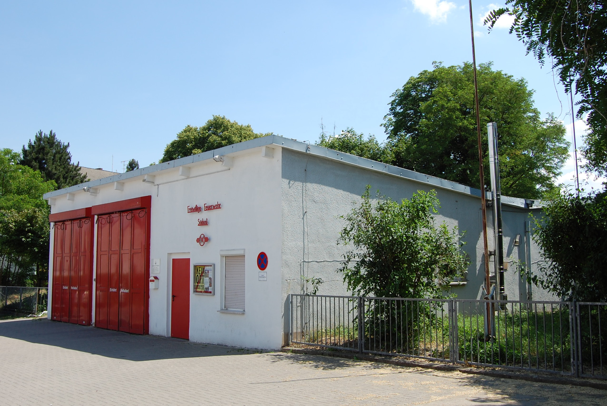 Gerätehaus der Freiwilligen Feuerwehr Magdeburg-Südost in der Zackmünder Straße